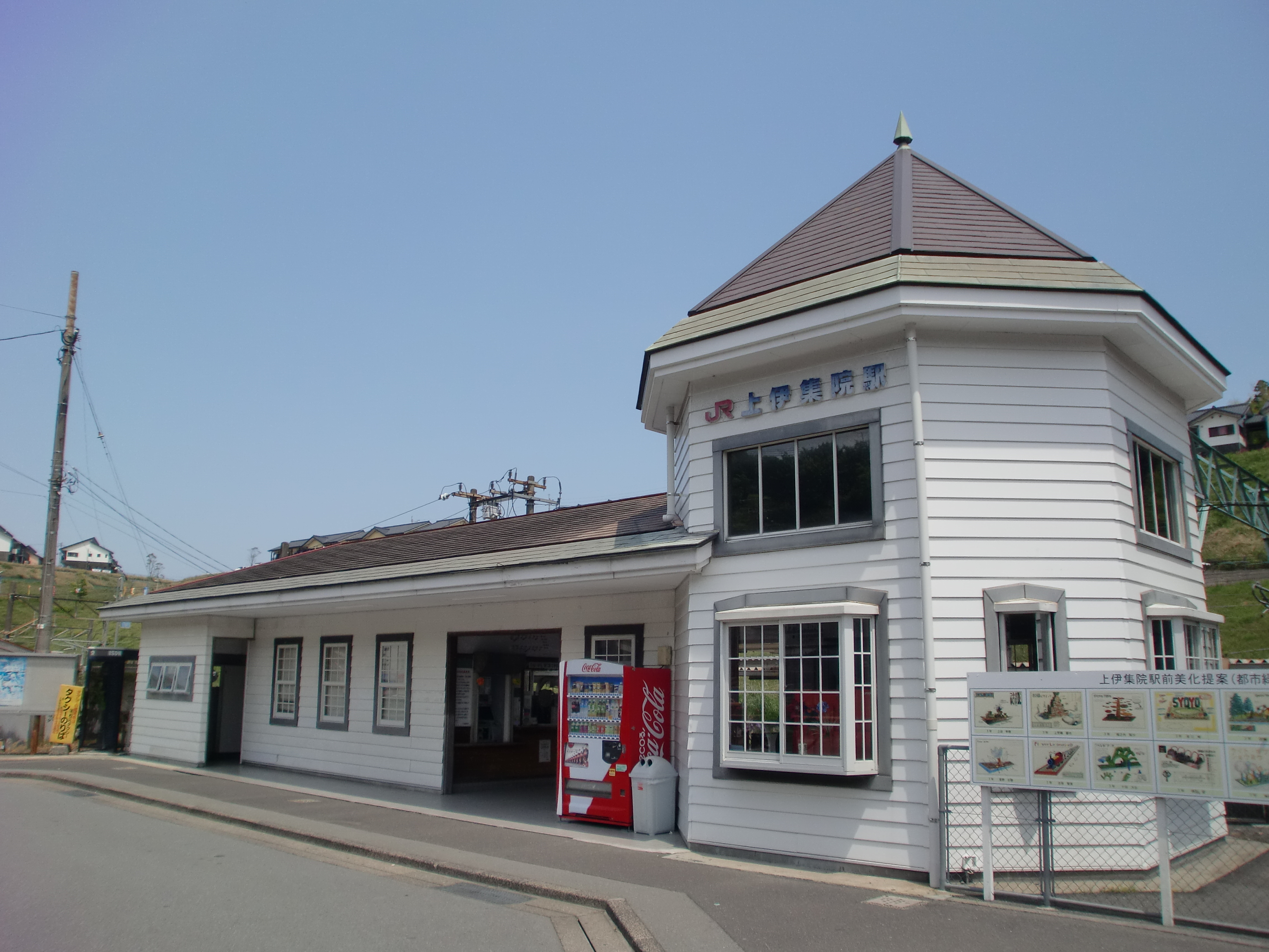 上伊集院駅の駅舎。